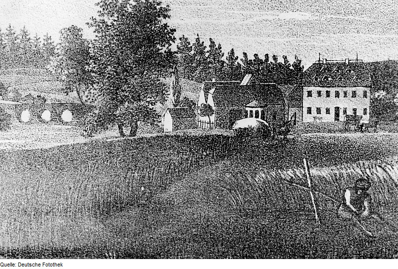 Original image description from the Deutsche Fotothek Tharandt-Grillenburg. Neuer Mühlengasthof (rechts) und alte Schloßbrücke (links)